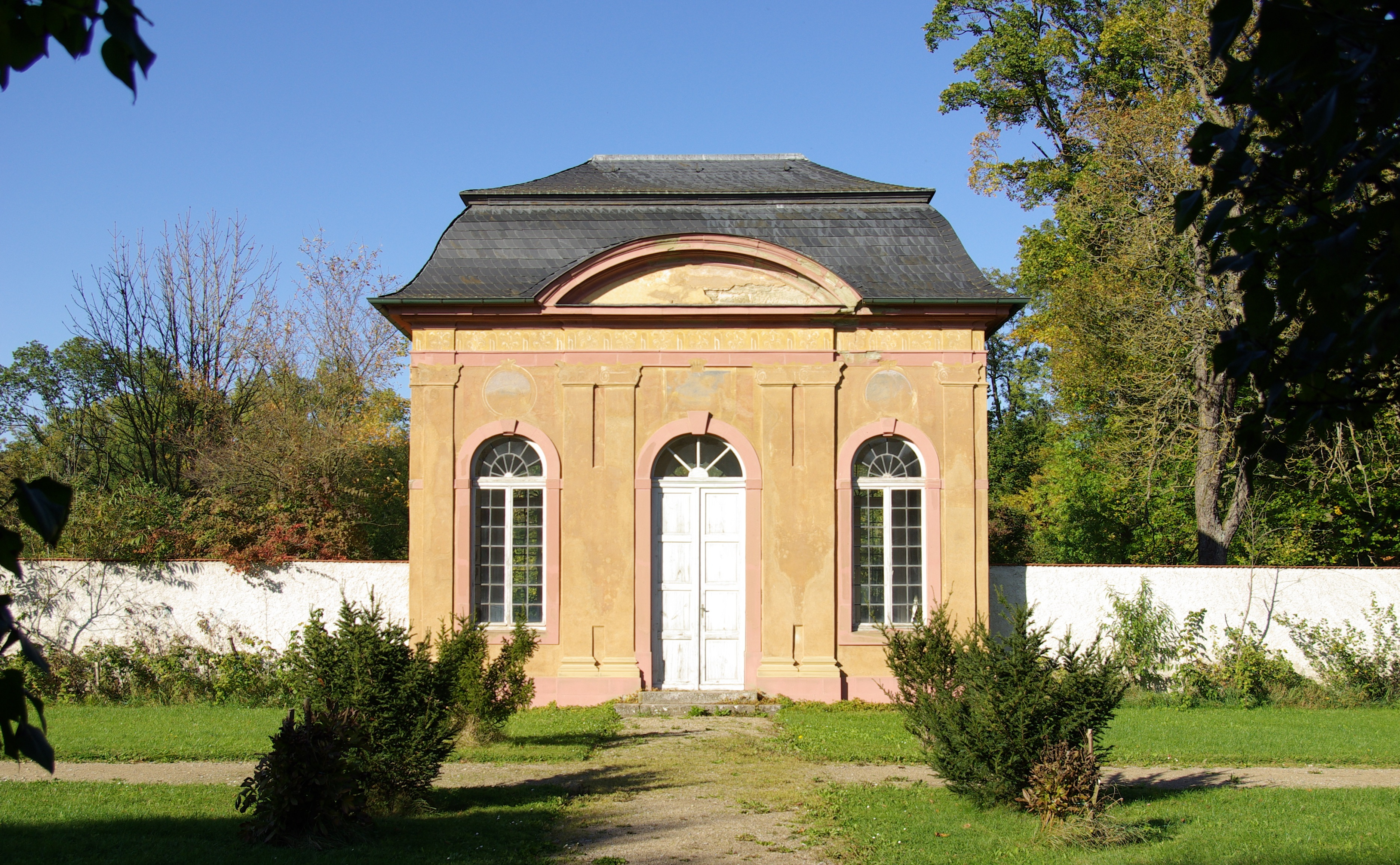 Schloss Ullstadt, Rokoko-Salettl im Schlossgarten